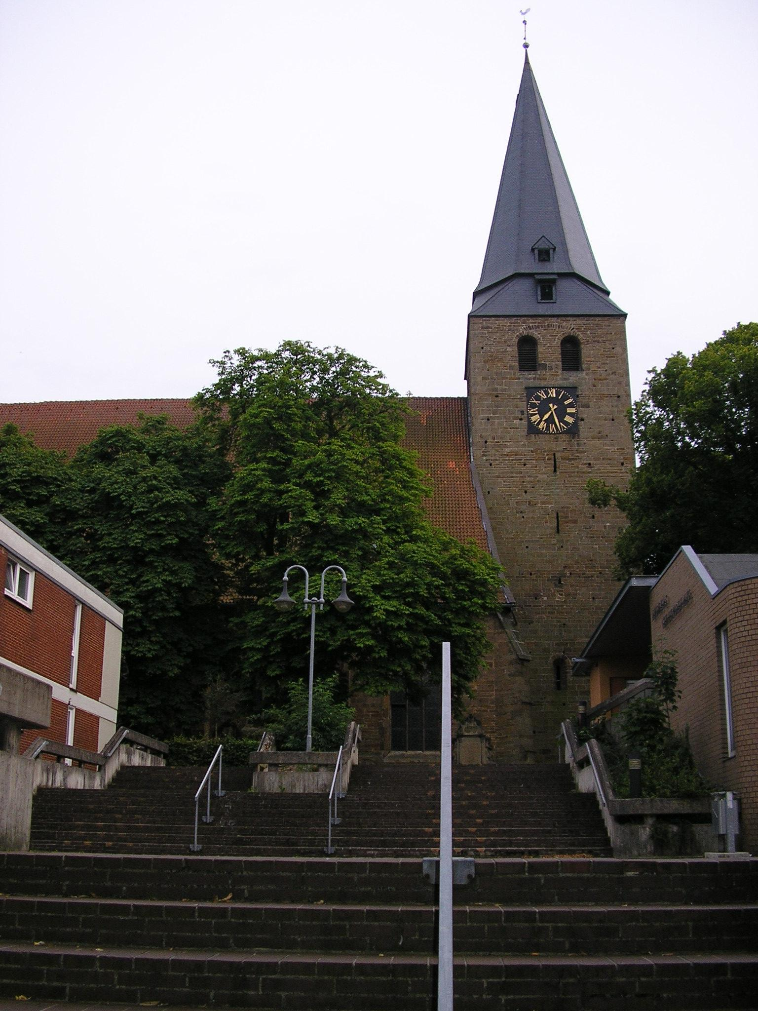 Sant Andrea Kirch zu Lübbecke